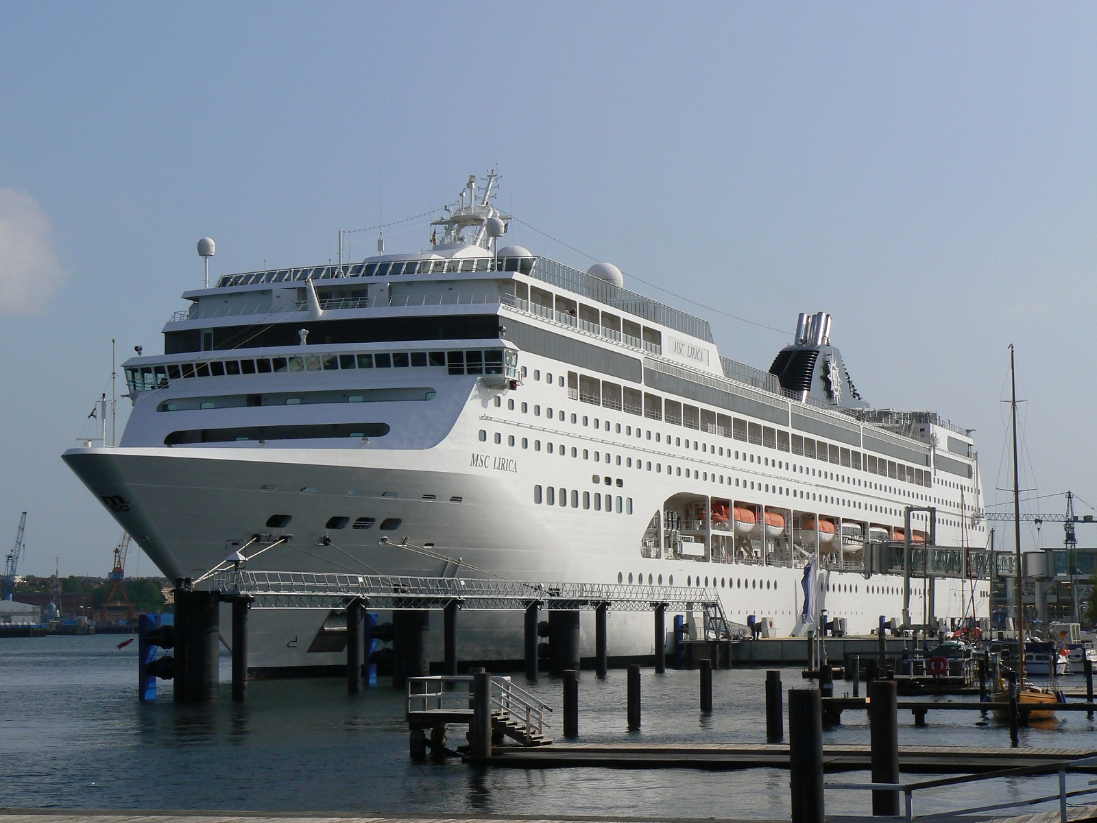 Kreuzfahrtschiff MSC Lirica im Hafen von Kiel am Ostseekai.